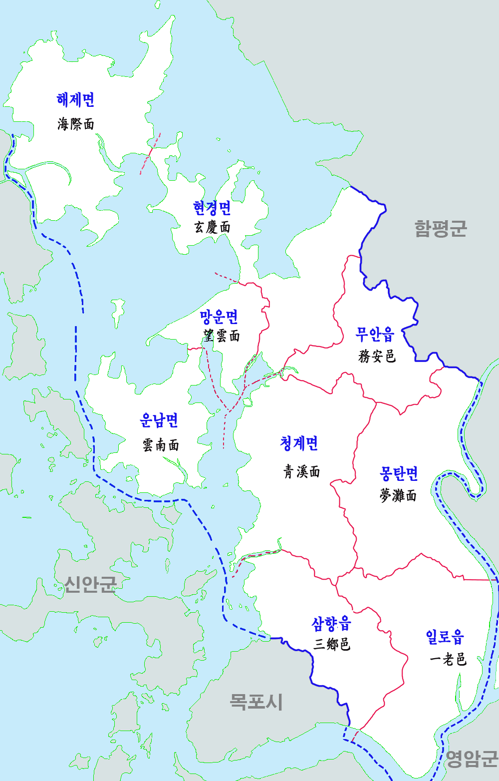 무안군 행정구역도